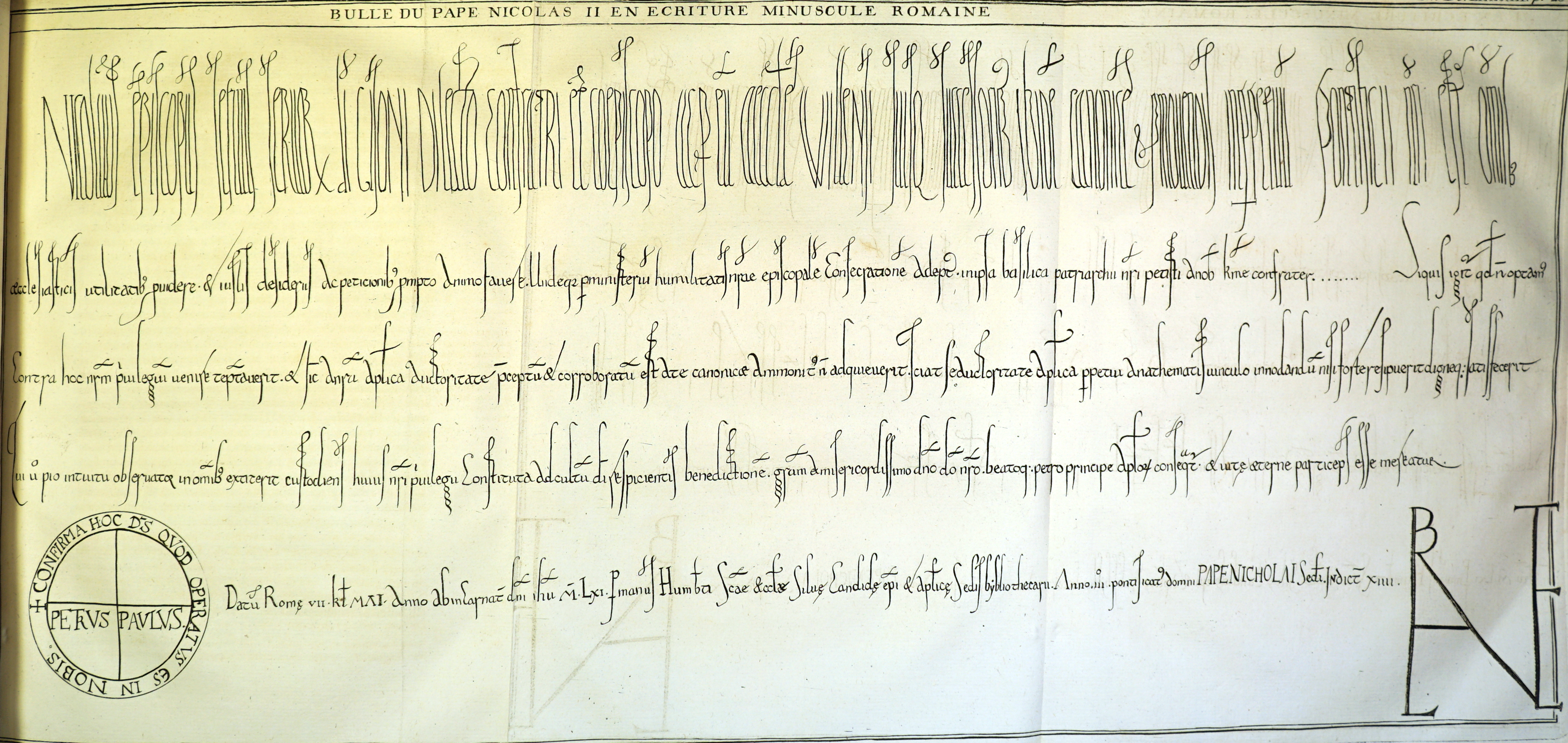 extrait de "Nouveau traité de diplomatique, ...".